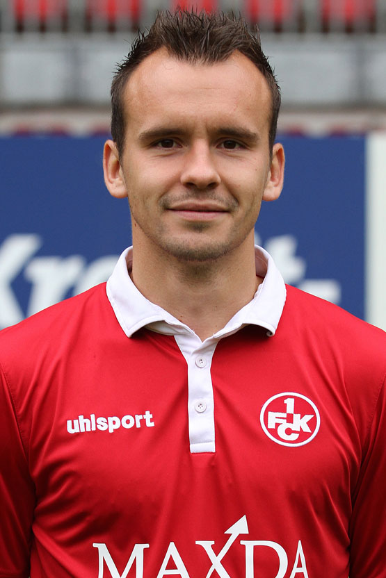 Andre Fomitschow